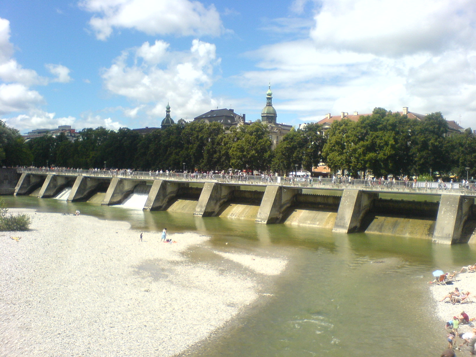 Wehrsteg in München-Lehel